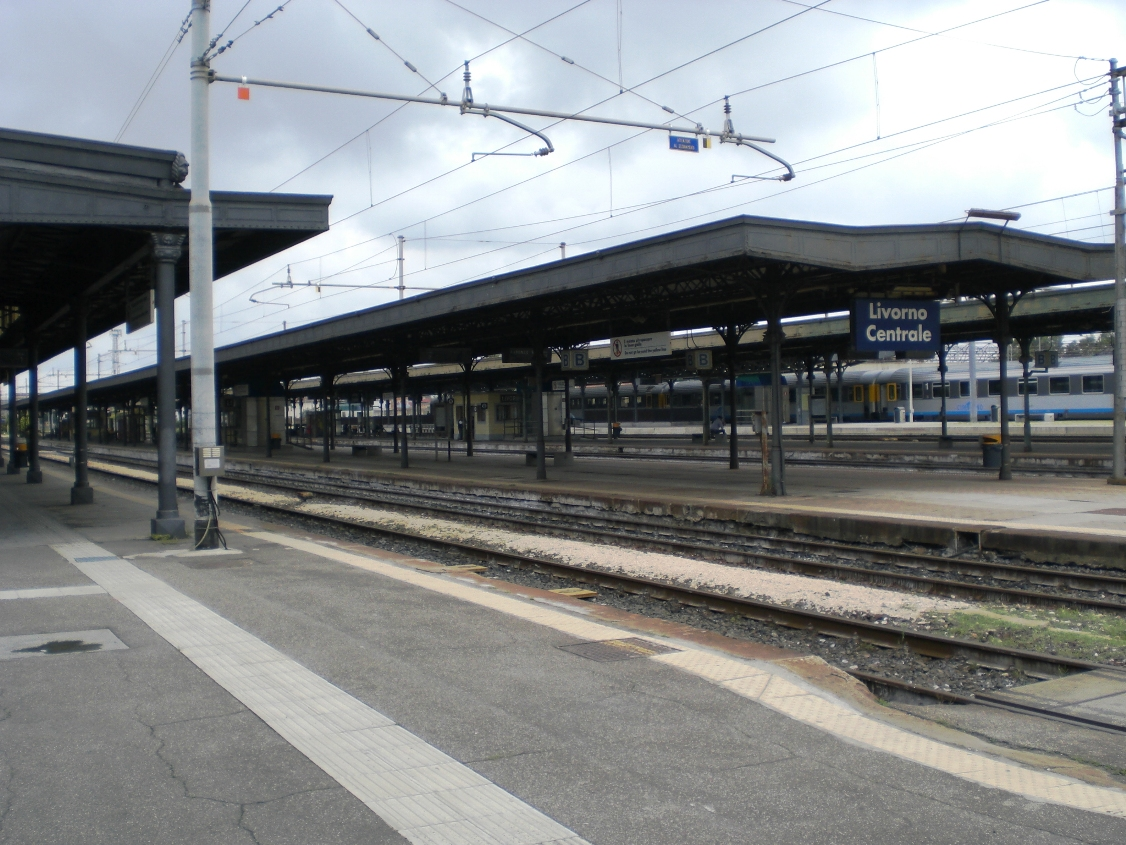 Livorno F.S_2